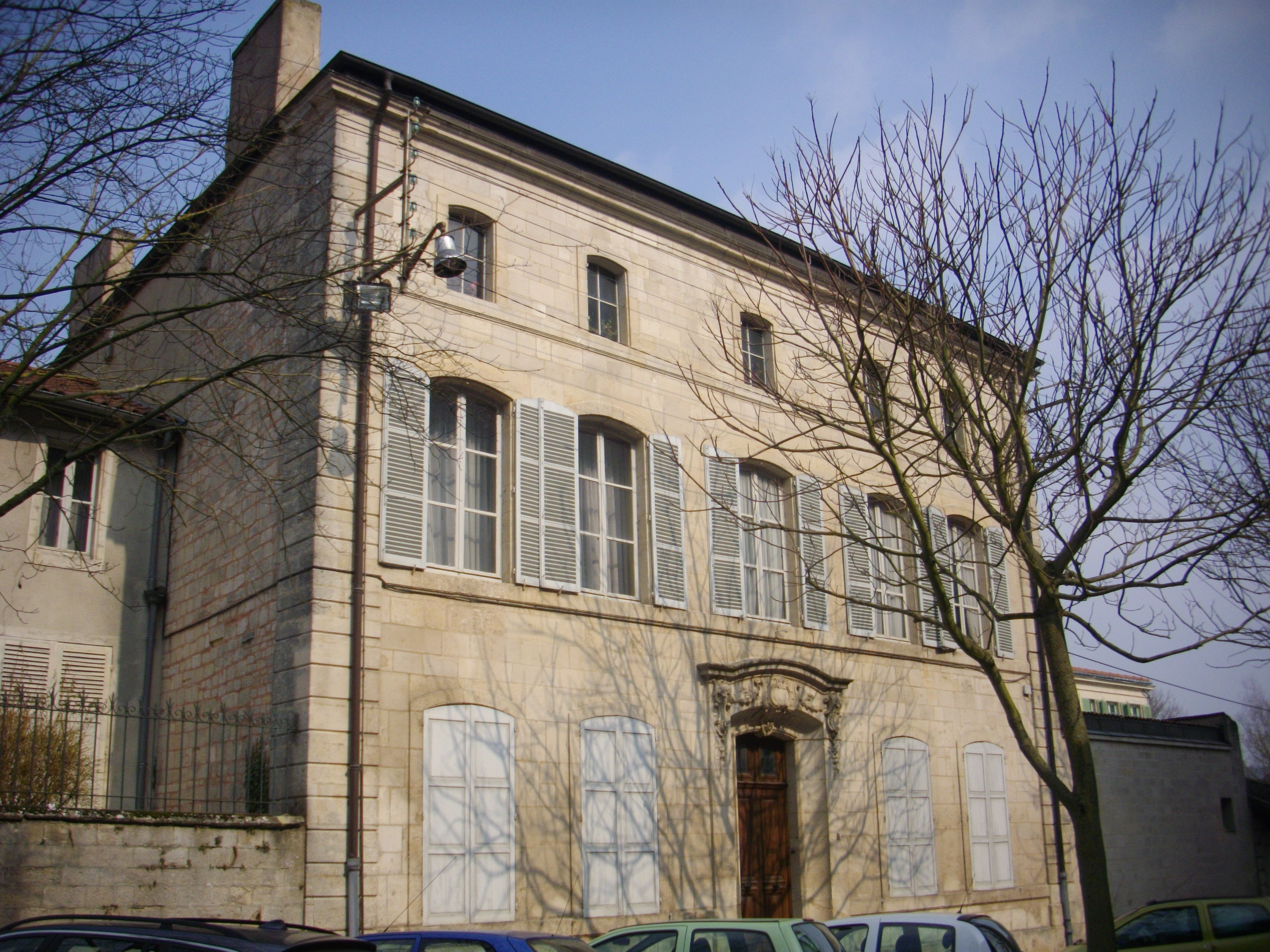 Immeuble Noguez (Inscrit) à Verdun (Meuse, France) .